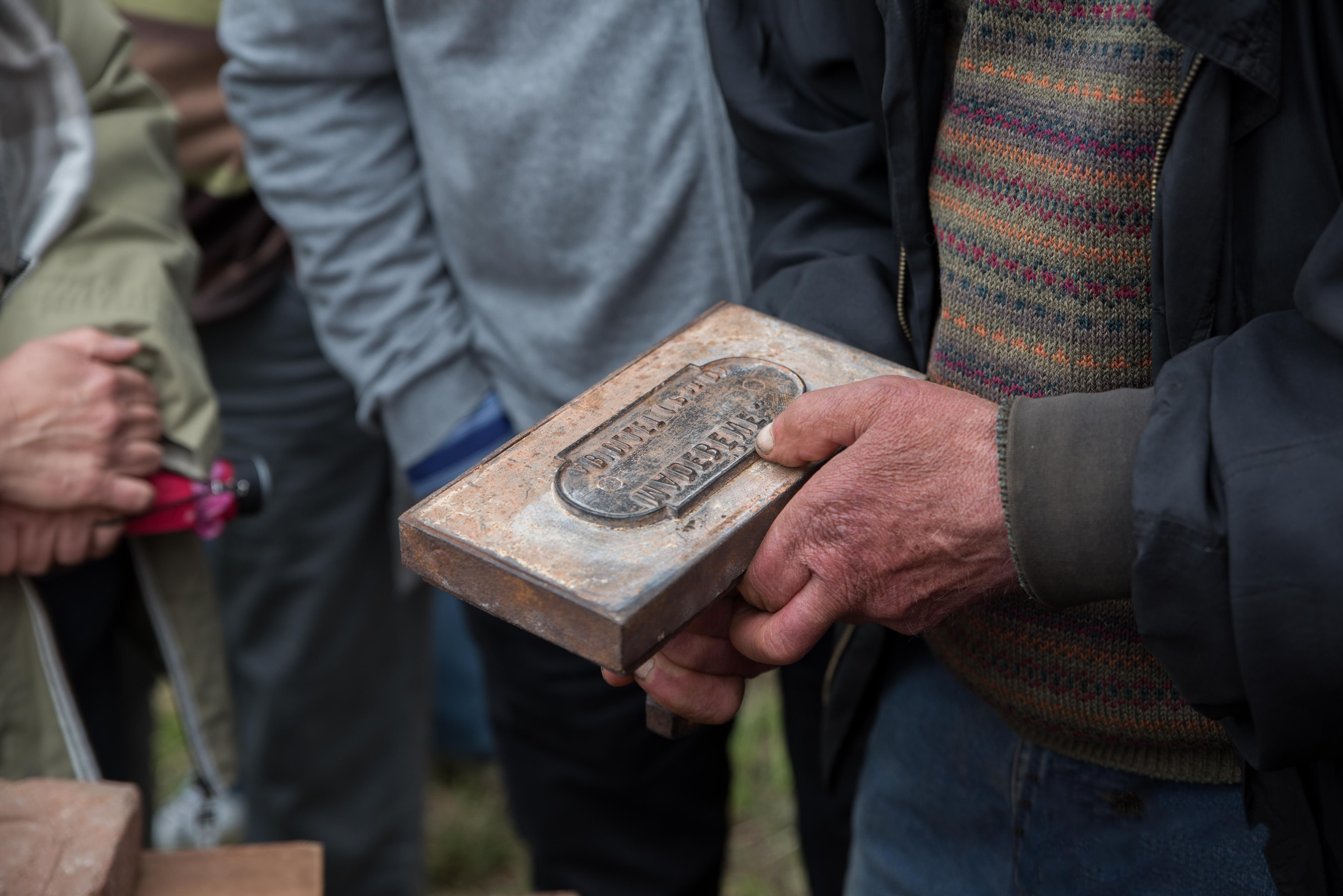 Plaque de laiton qui s'insère sur le dessus du moule à briques